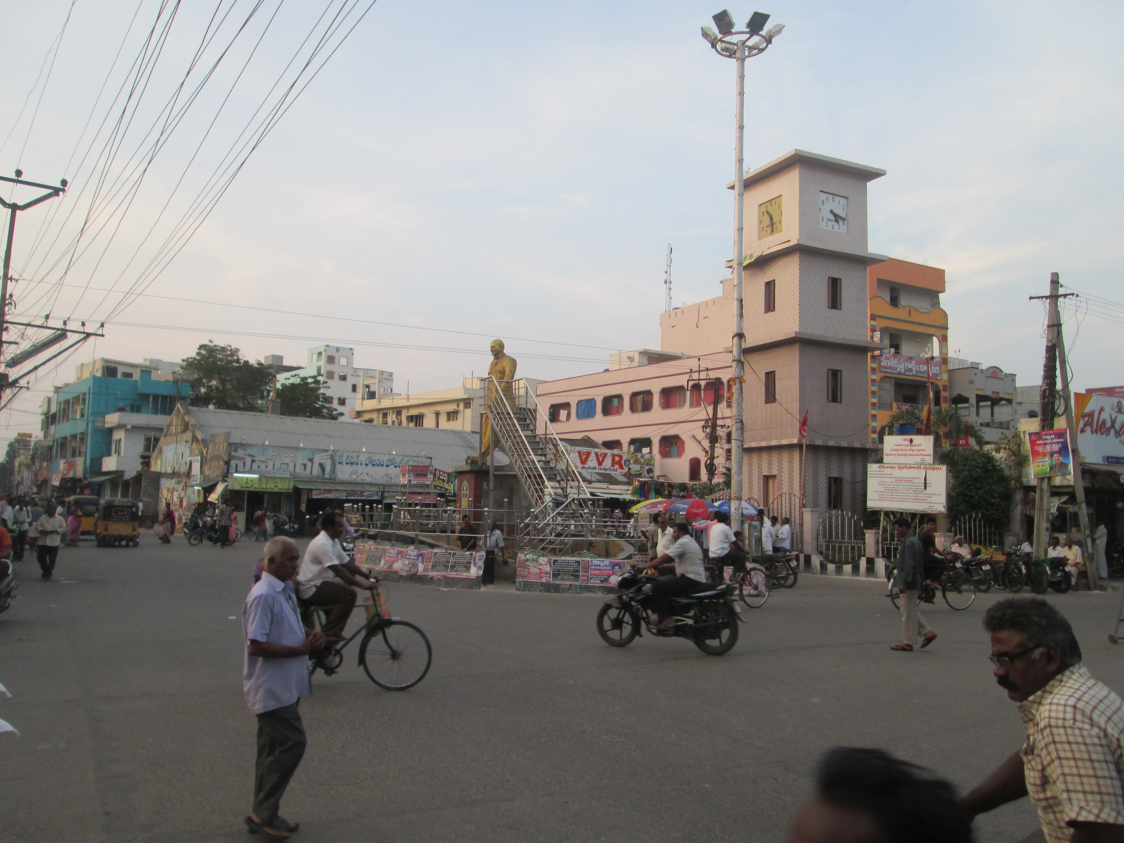 క్లాక్ టవర్ సెంటర్, చీరాల